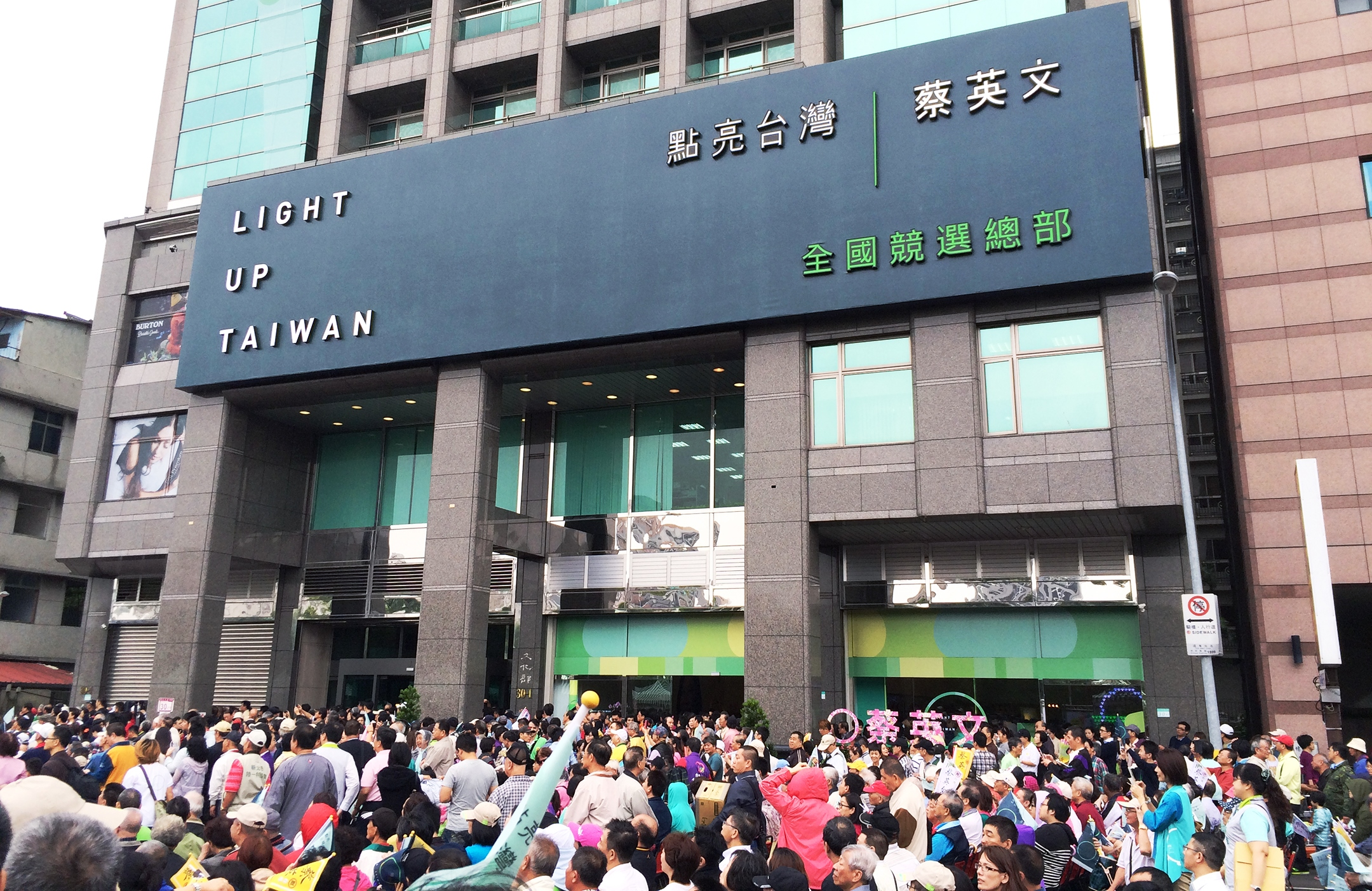 中文（台灣）: 2016年中華民國總統選舉，民主進步黨總統候選人蔡英文全國競選總部設於匯泰大樓1樓。